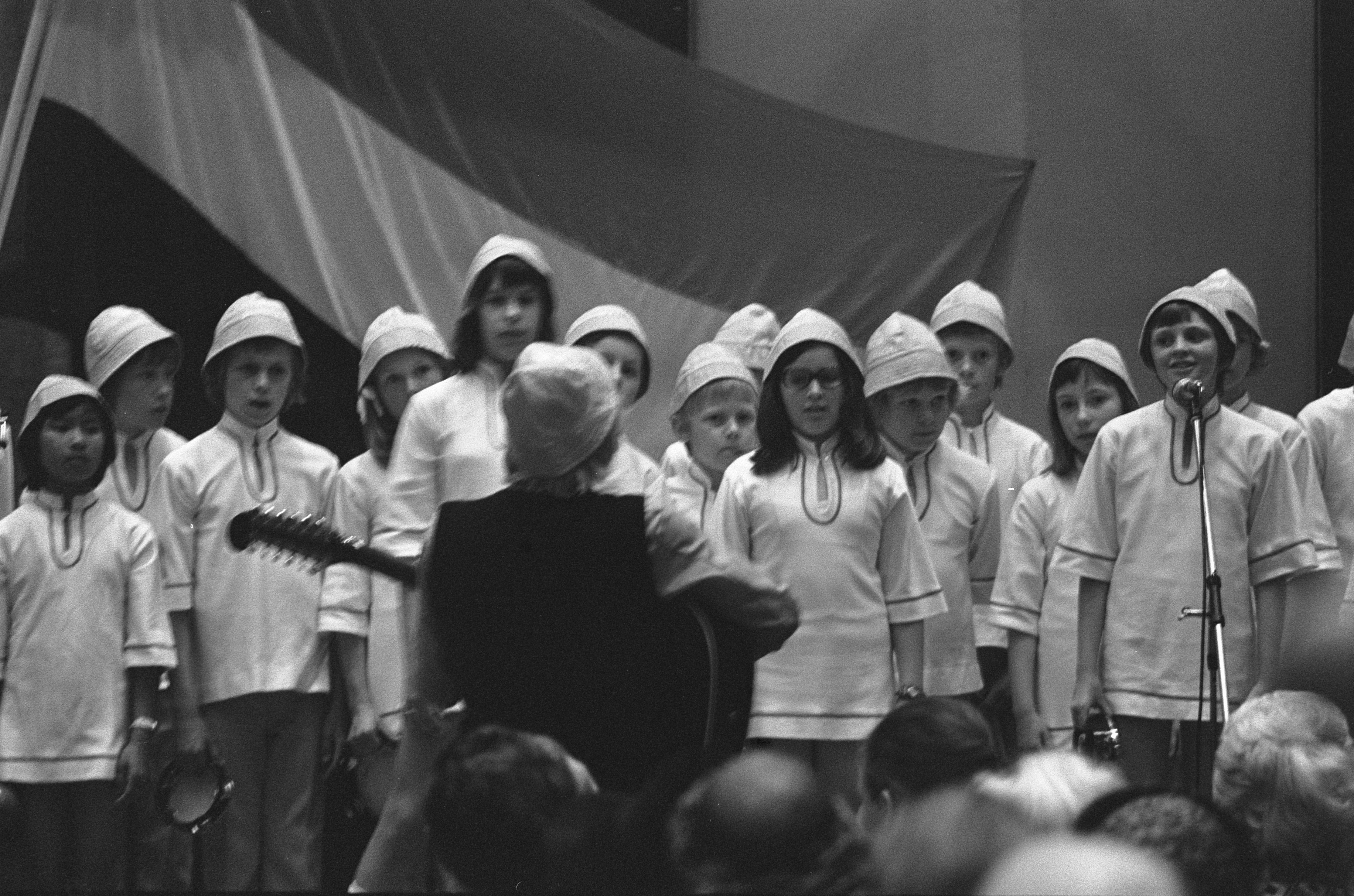 Collectie / Archief : Fotocollectie Anefo Reportage / Serie : [ onbekend ] Beschrijving : State of Israel Bonds in Glazen Zaal in RAI, opdracht heer Sijer Datum : 20 mei 1974 Persoonsnaam : Glazen Zaal Instellingsnaam : State of Israel Bonds Fotograaf : Peters, Hans / Anefo Auteursrechthebbende : Nationaal Archief Materiaalsoort : Negatief (zwart/wit) Nummer archiefinventaris : bekijk toegang 2.24.01.05 Bestanddeelnummer : 927-2037